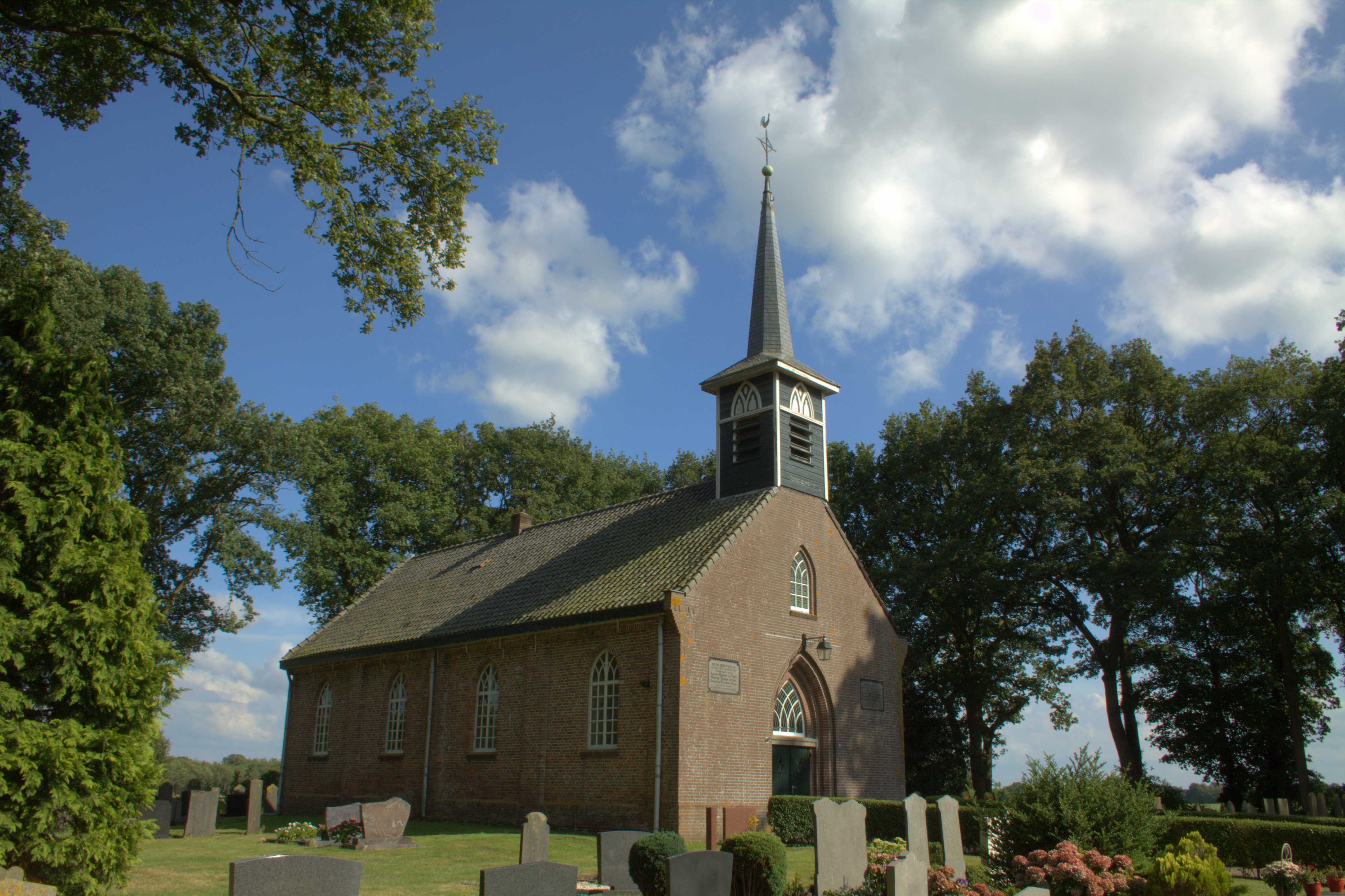 Het kerkje van Blesdijke uit 1843 lekker in het zonnetje.